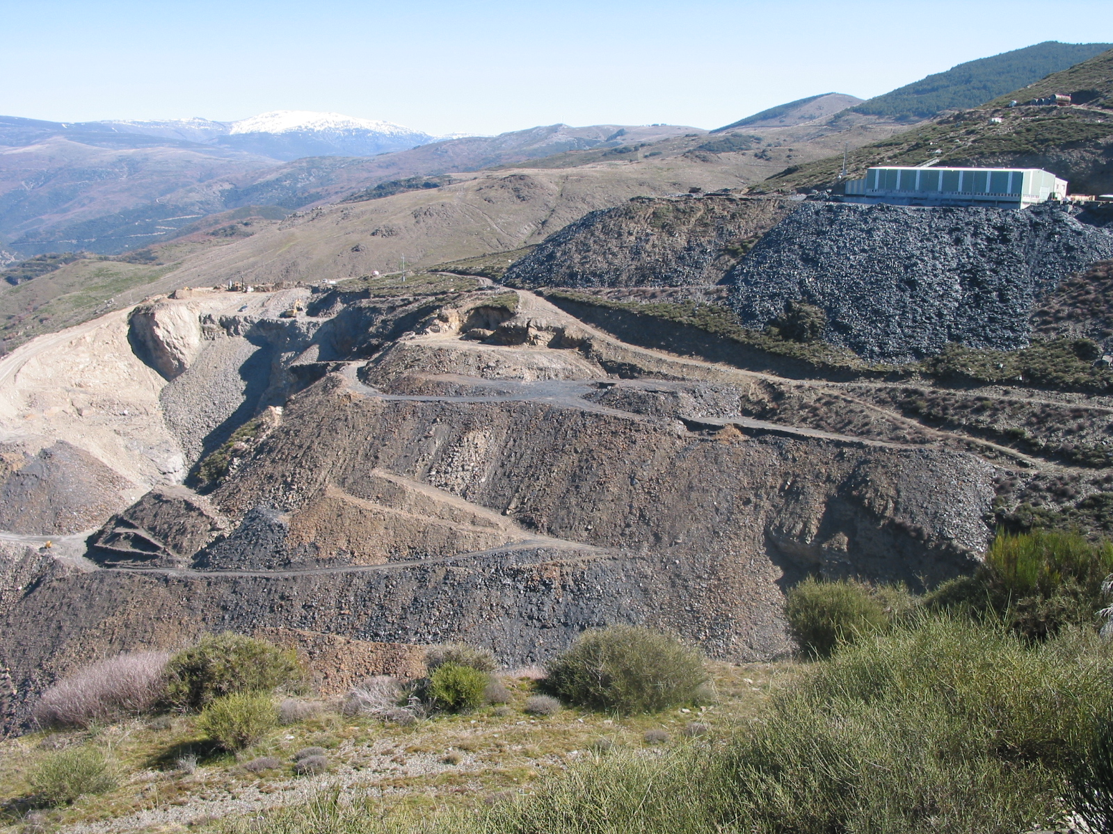 Bildbeschreibung: Schieferabbau in Spanien Quelle: selber fotografiert Fotograf: Stefanie Lindener Datum: 10.05.2006